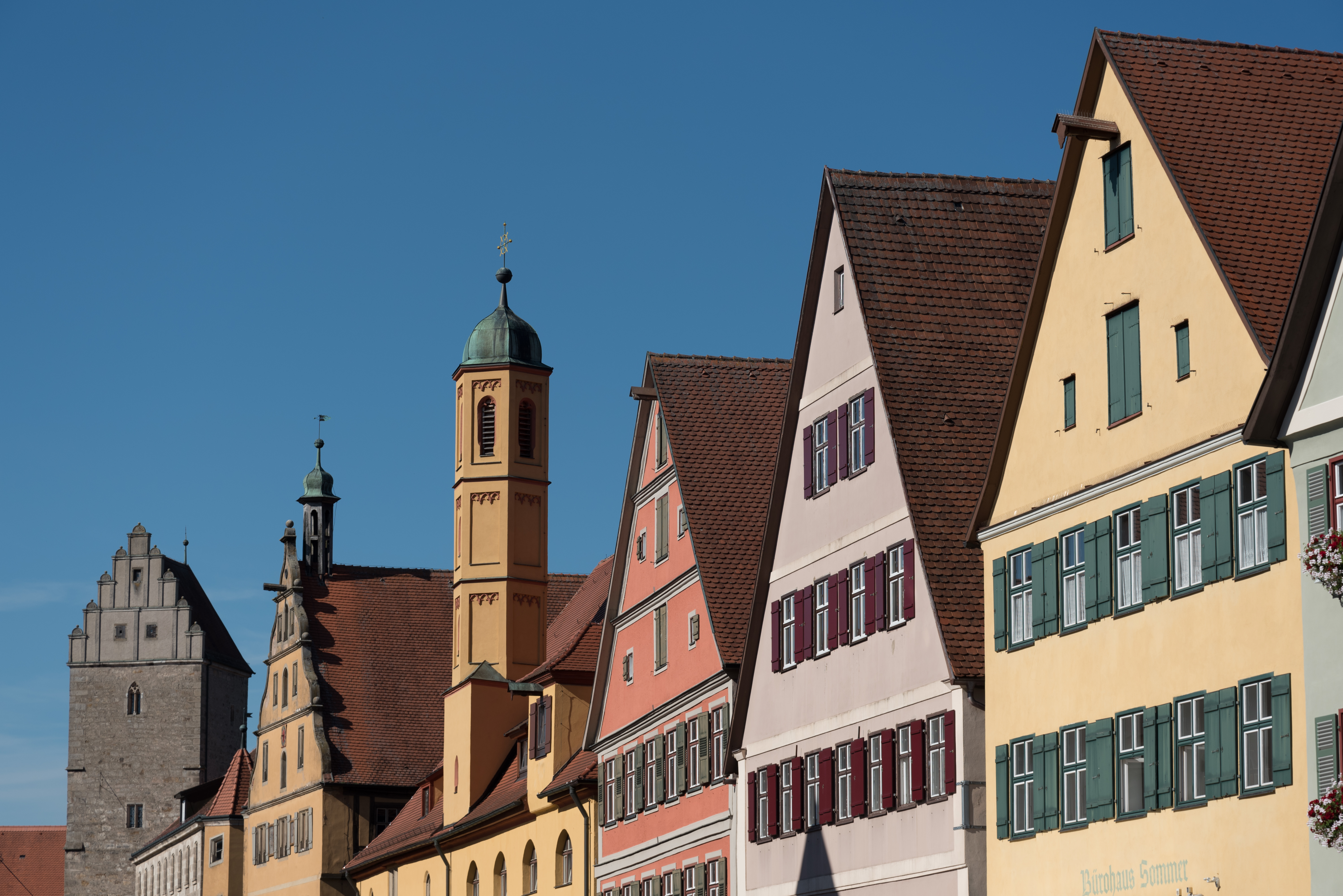 Dinkelsbühl, Dr.-Martin-Luther-Straße 6 bis 2, Weinmarkt 16